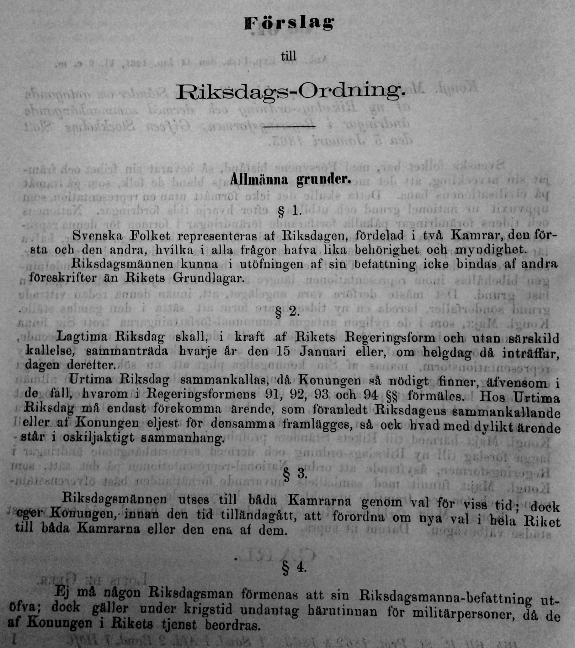 Första sidan av Oscar I:s förslag till nationlrepresentation från 1848.